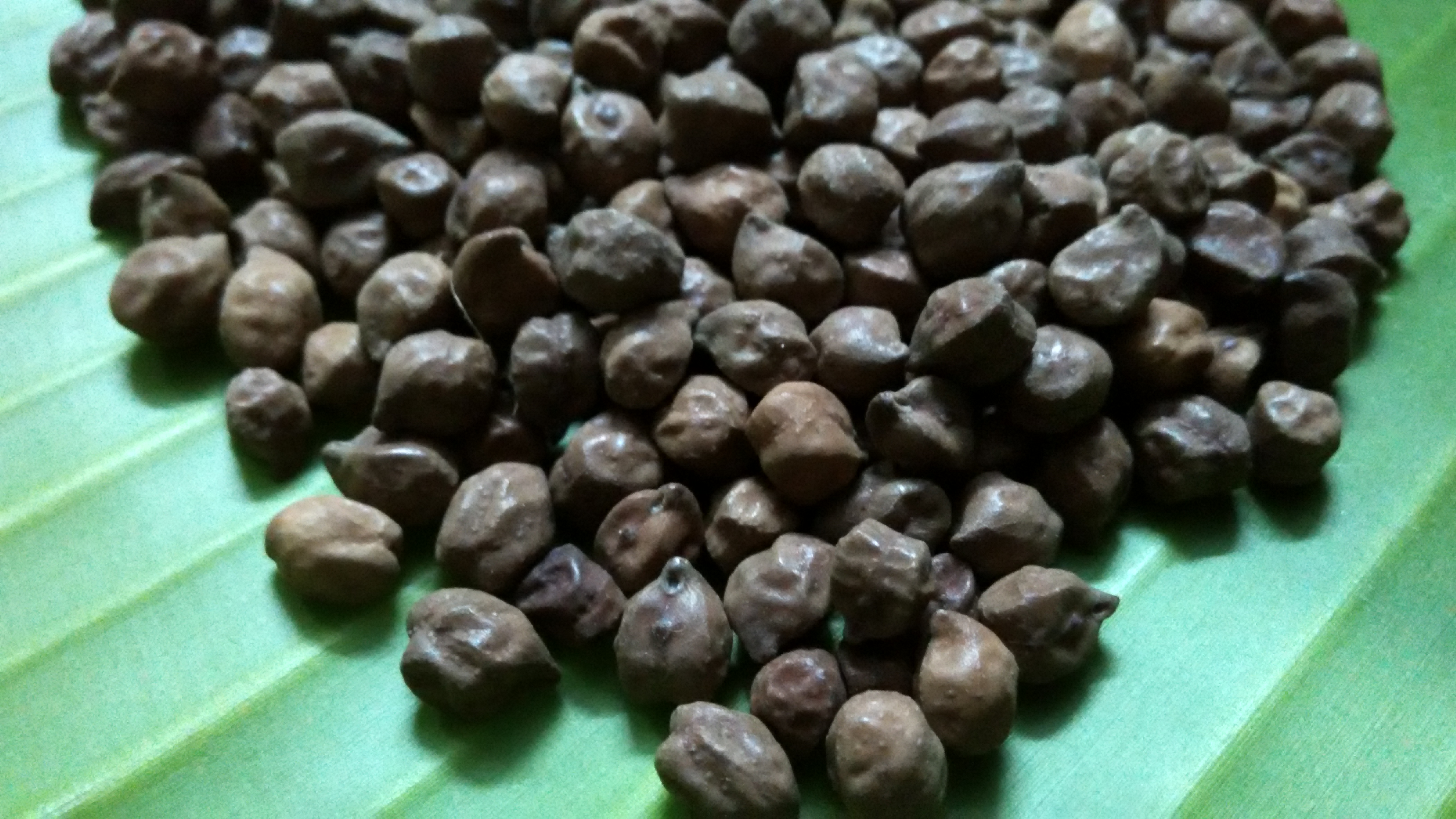 மூக்குக்கடலை கருப்பு.